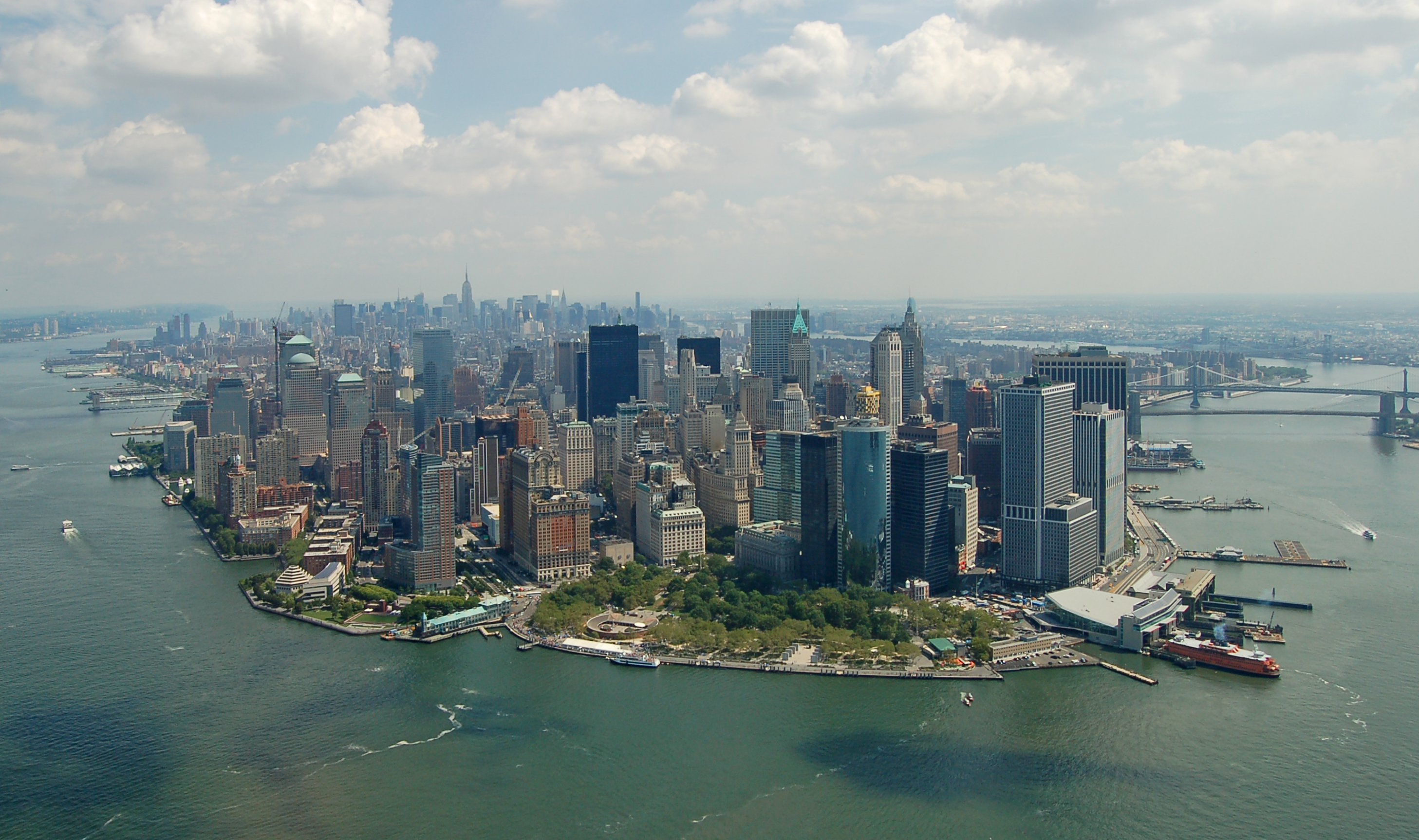 L'île de Manhattan vue d'hélicoptère.